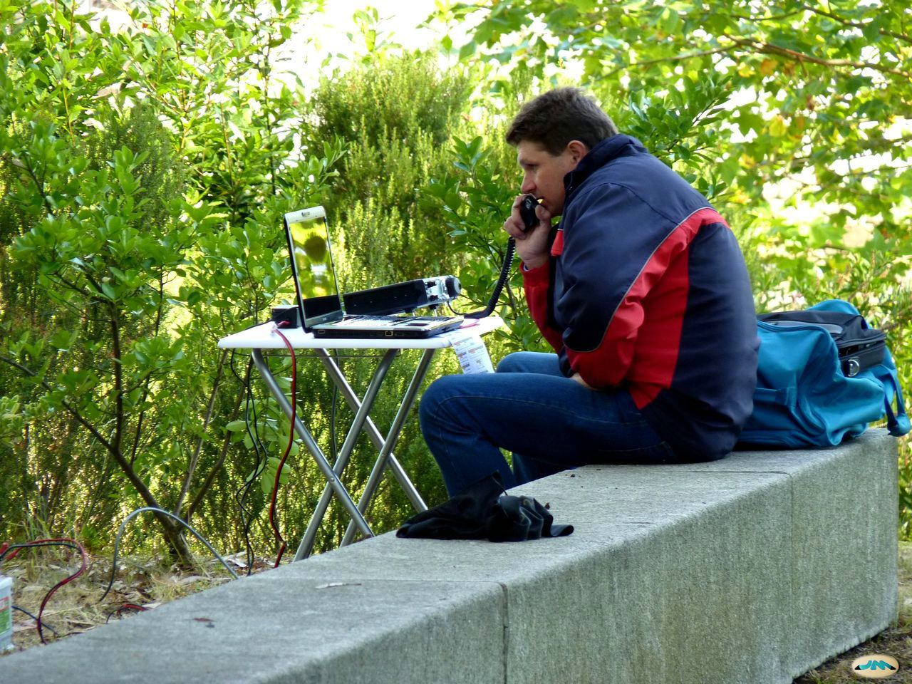 Un radioaficionado